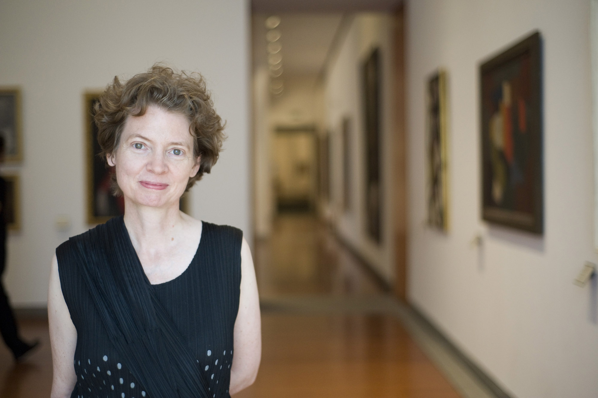 Directeur du musée des Beaux-Arts de Lyon